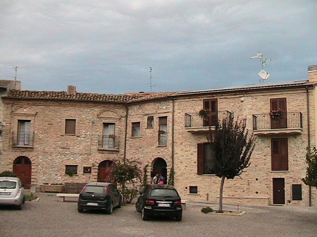 Scorcio